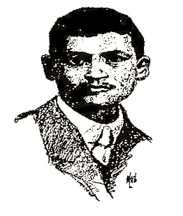 יצחק אחדותי